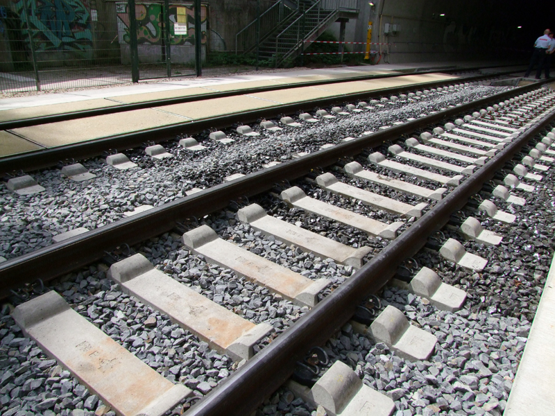 Eisenbahngleise mit Schotter und "geklebten Schotter" (hier erkennbar an dem dunklen Schotter). Im Hintergrund Feste Fahrbahn